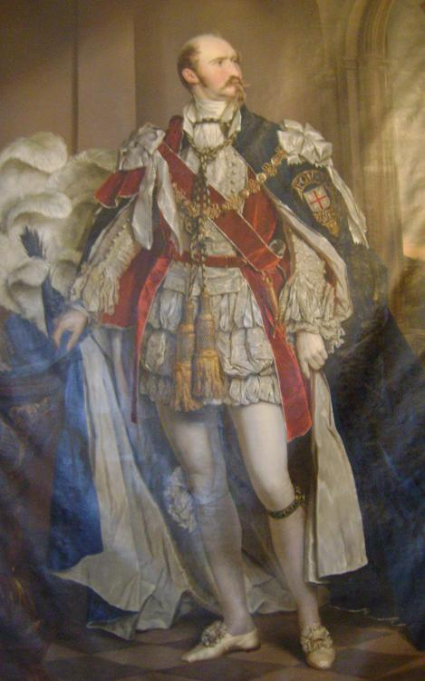 Herzog Bernhard II. von Sachsen-Meiningen als Ritter des Hosenbandordens, Gemälde von Samuel Diez, 1830, Gemäldegalerie Staatliche Museen Meiningen